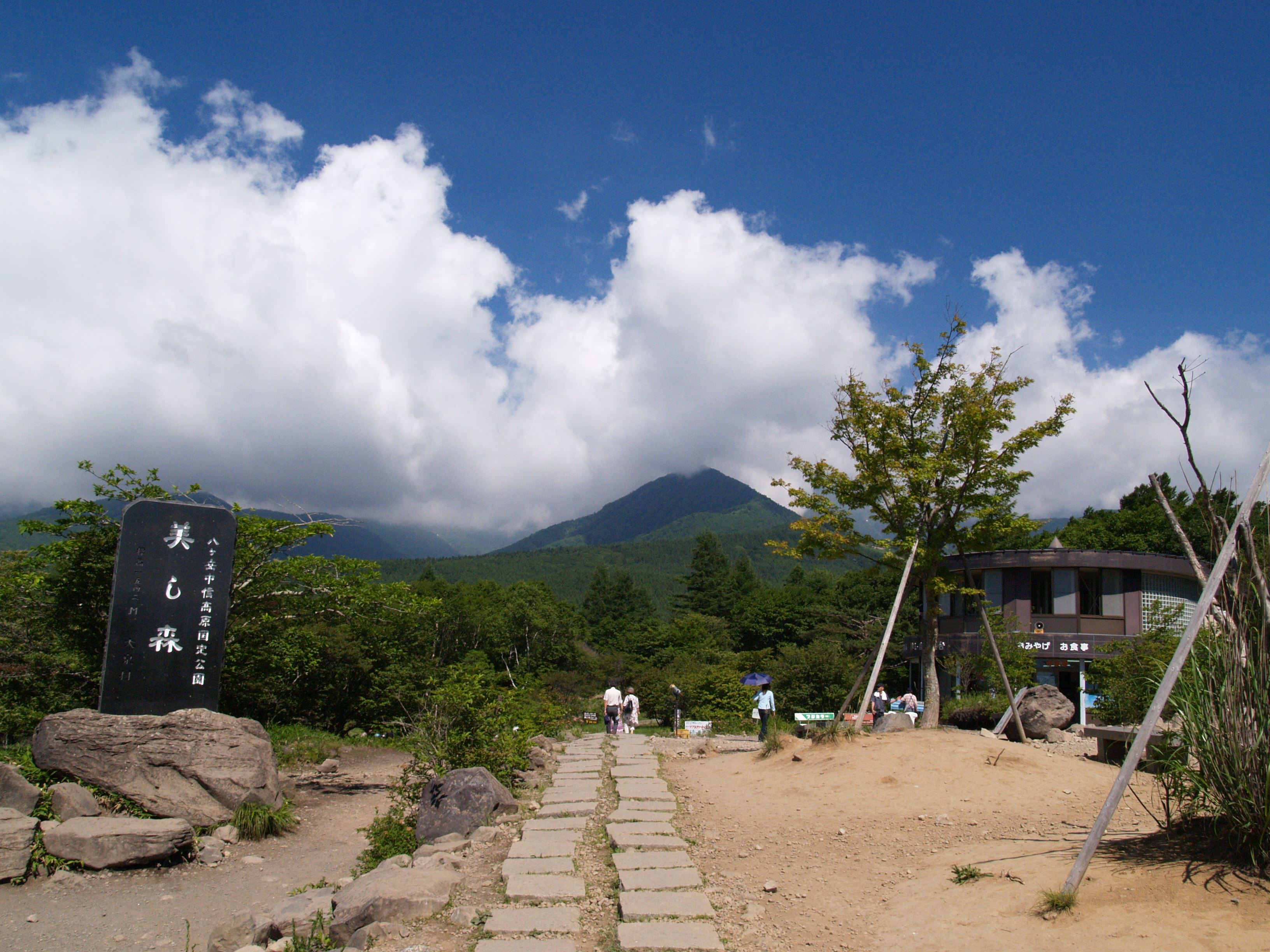 美し森山頂